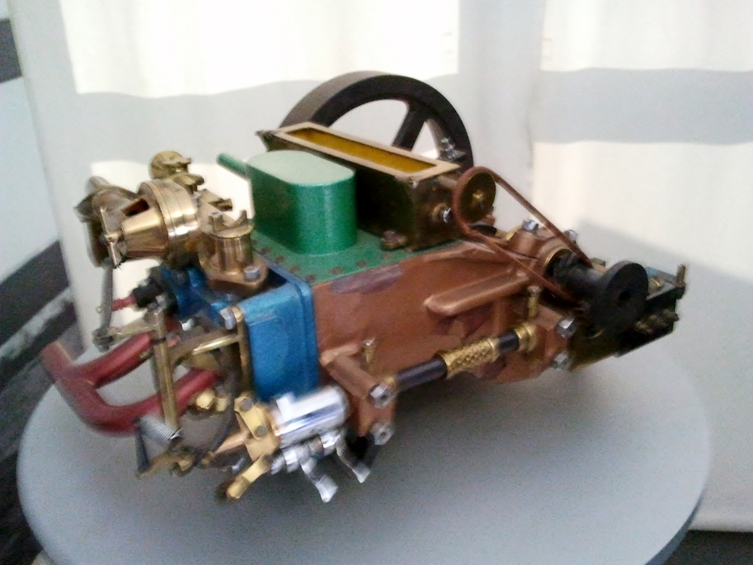 Motor del Fiat 4HP en el Centro Storico Fiat